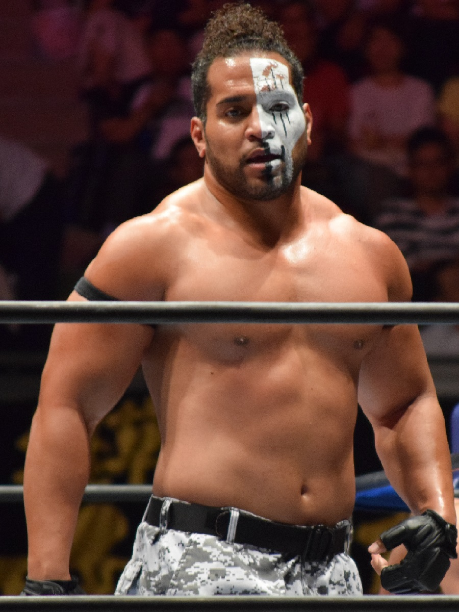 2016年9月25日 ワールド記念ホール「DESTRUCTION in KOBE」 タンガ・ロア